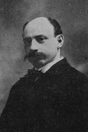 Le docteur Joseph-Pierre Gadbois fut un ardent promoteur de l'éducation physique. Le centre récréatif Gadbois, à Montréal, a été nommé en son honneur. rds.ca biographi.ca